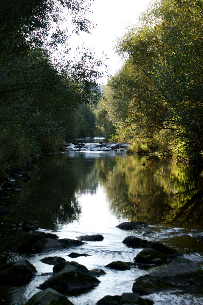 Die Vöckla bei Frankenmarkt an einem schönen Septembersonntag